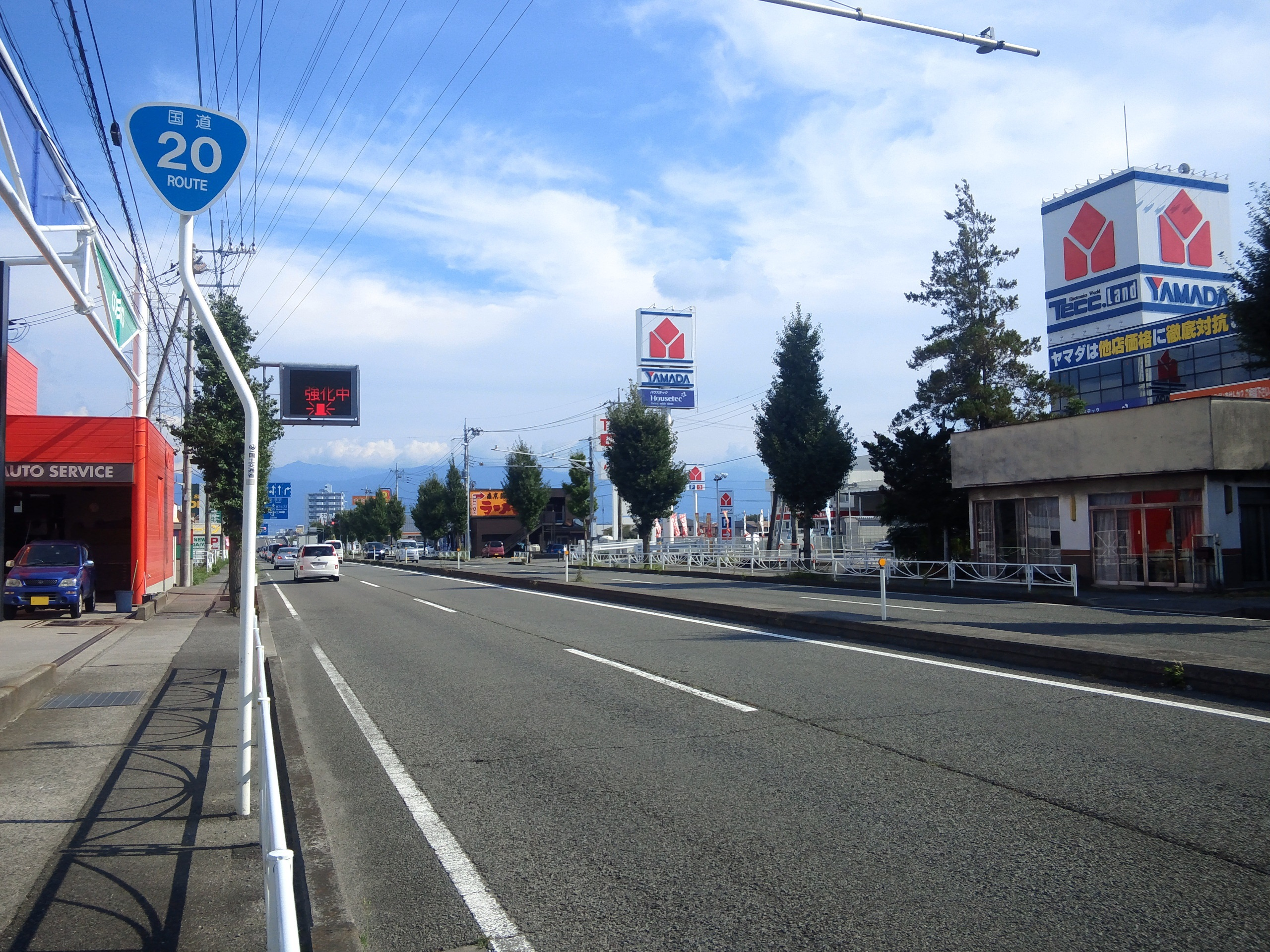 国道20号線（甲府バイパス）山梨県甲斐市富竹新田付近（甲府市方面を撮影）